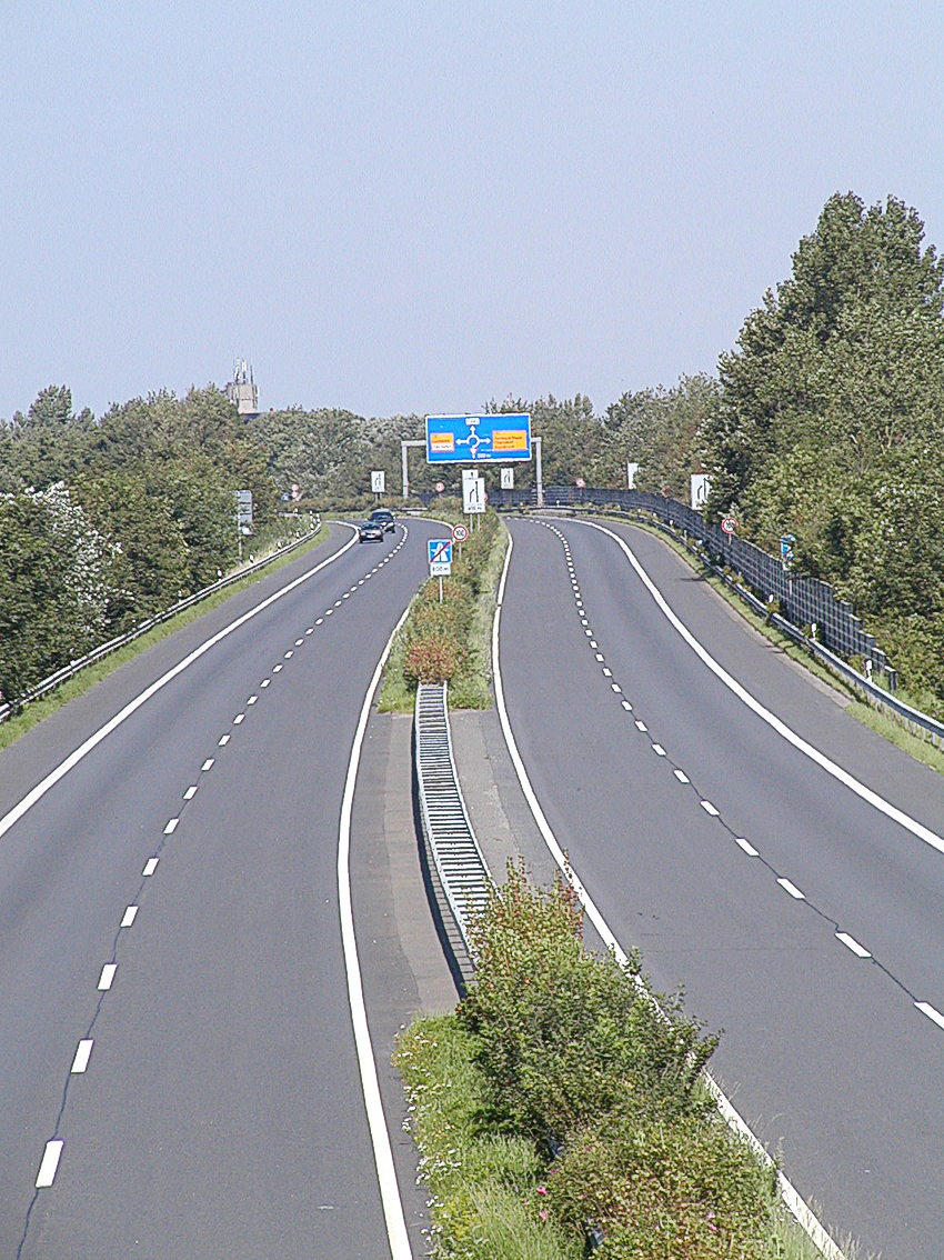 Das Ende der Bundesautobahn 27 in Cuxhaven